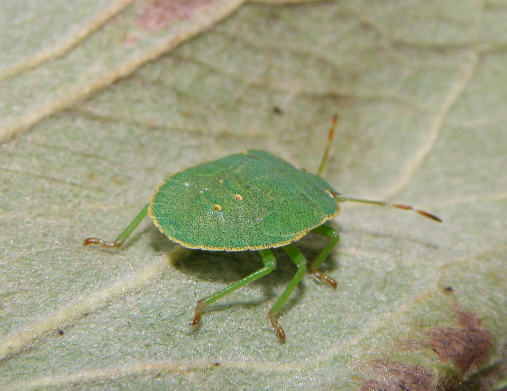 Pluskwiak - Odorek jednobarwek, zieleniak jednobarwek (Palomena viridissima)